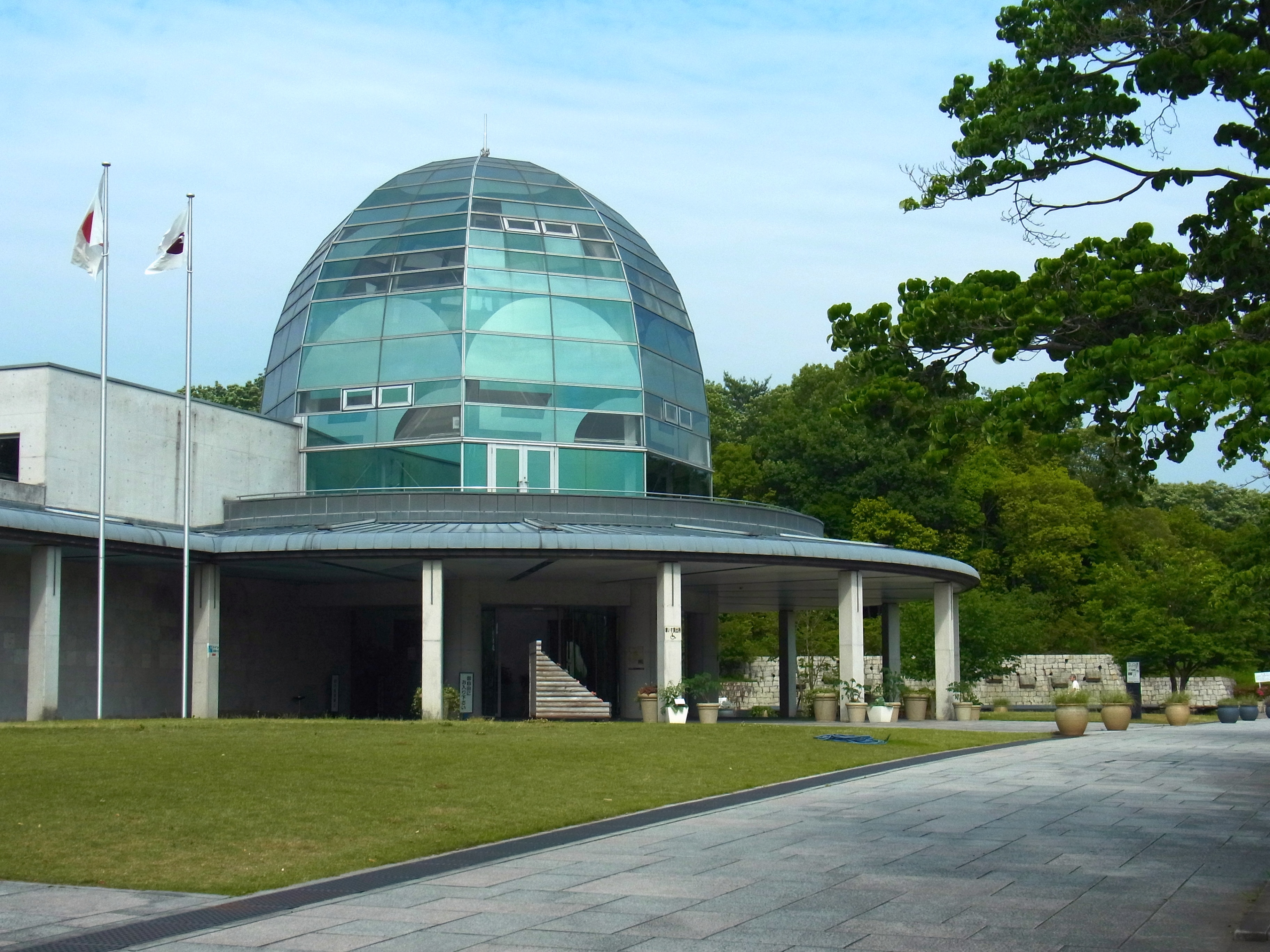 馬見丘陵公園 公園館 2012.6.07